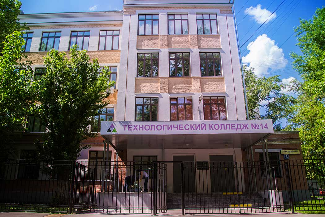 Здание Технологического колледжа №14 Факультет Индустрия гостеприимства